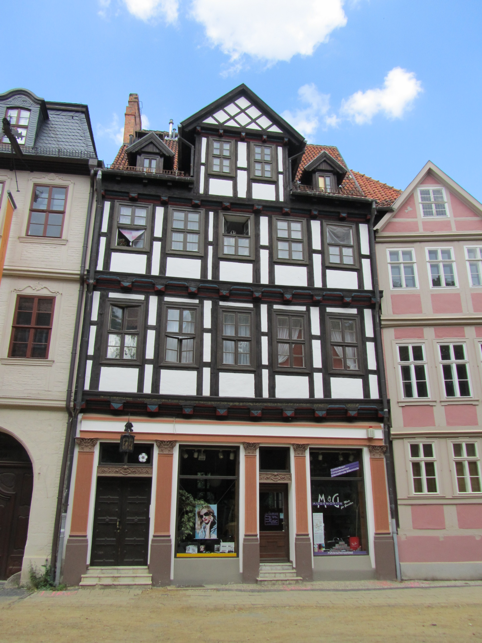 IMG_3896, Kornmarkt 7 in Quedlinburg